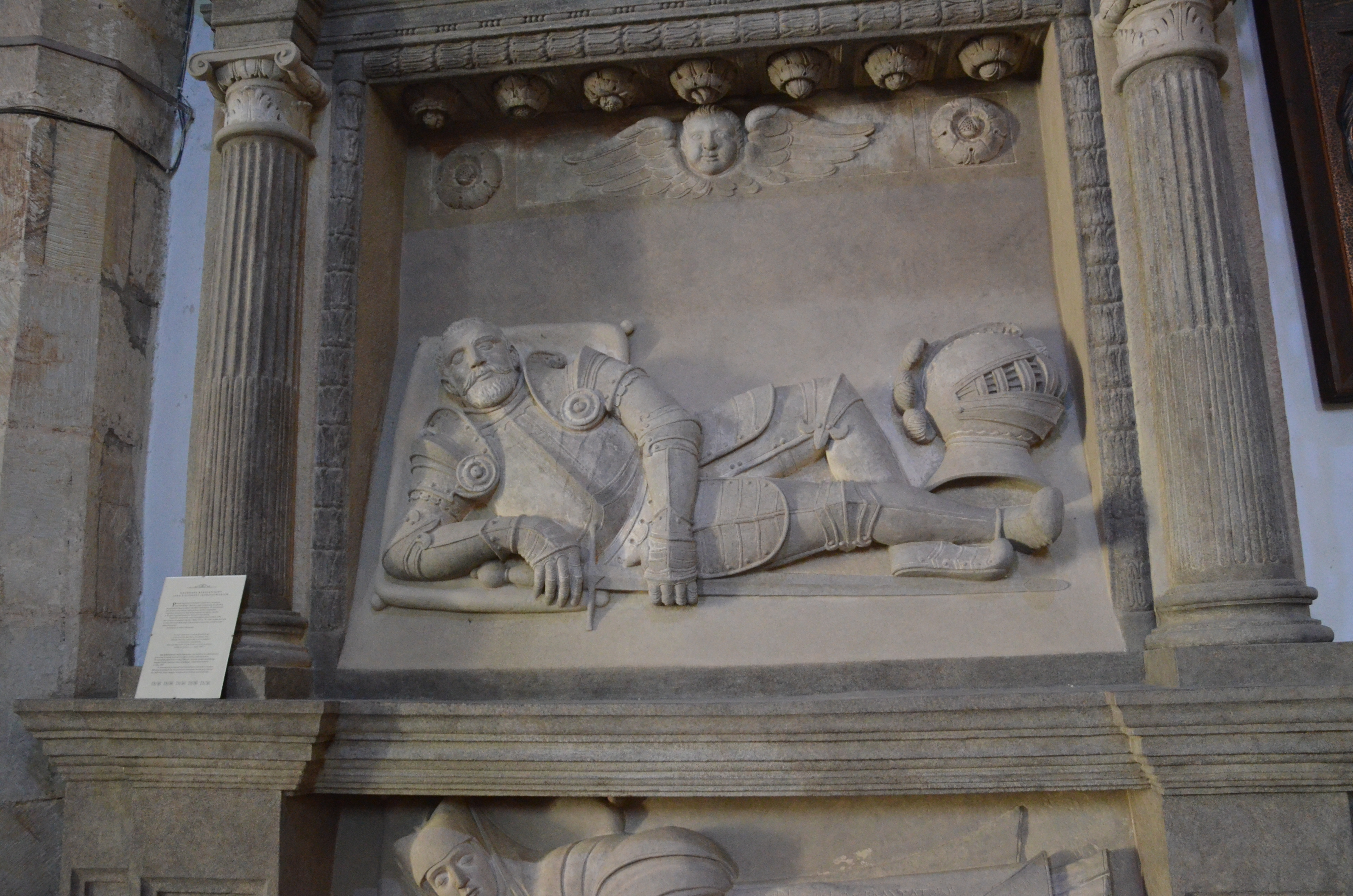 Joannes Andrzejowsky haeres in Potok